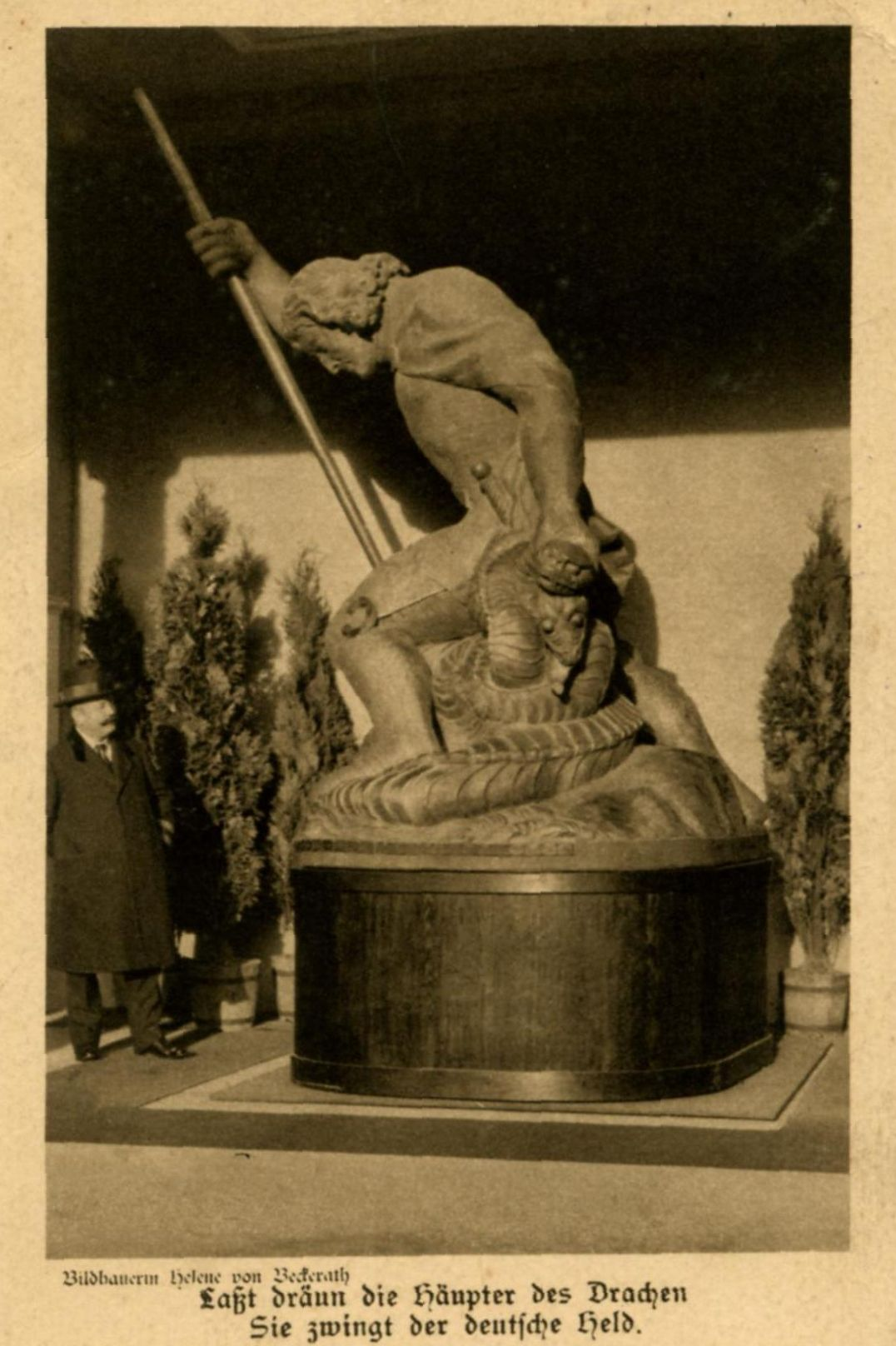 Nagelungsdenkmal "Der Eiserne Georg" in Krefeld, geschaffen von Helene von Beckerath